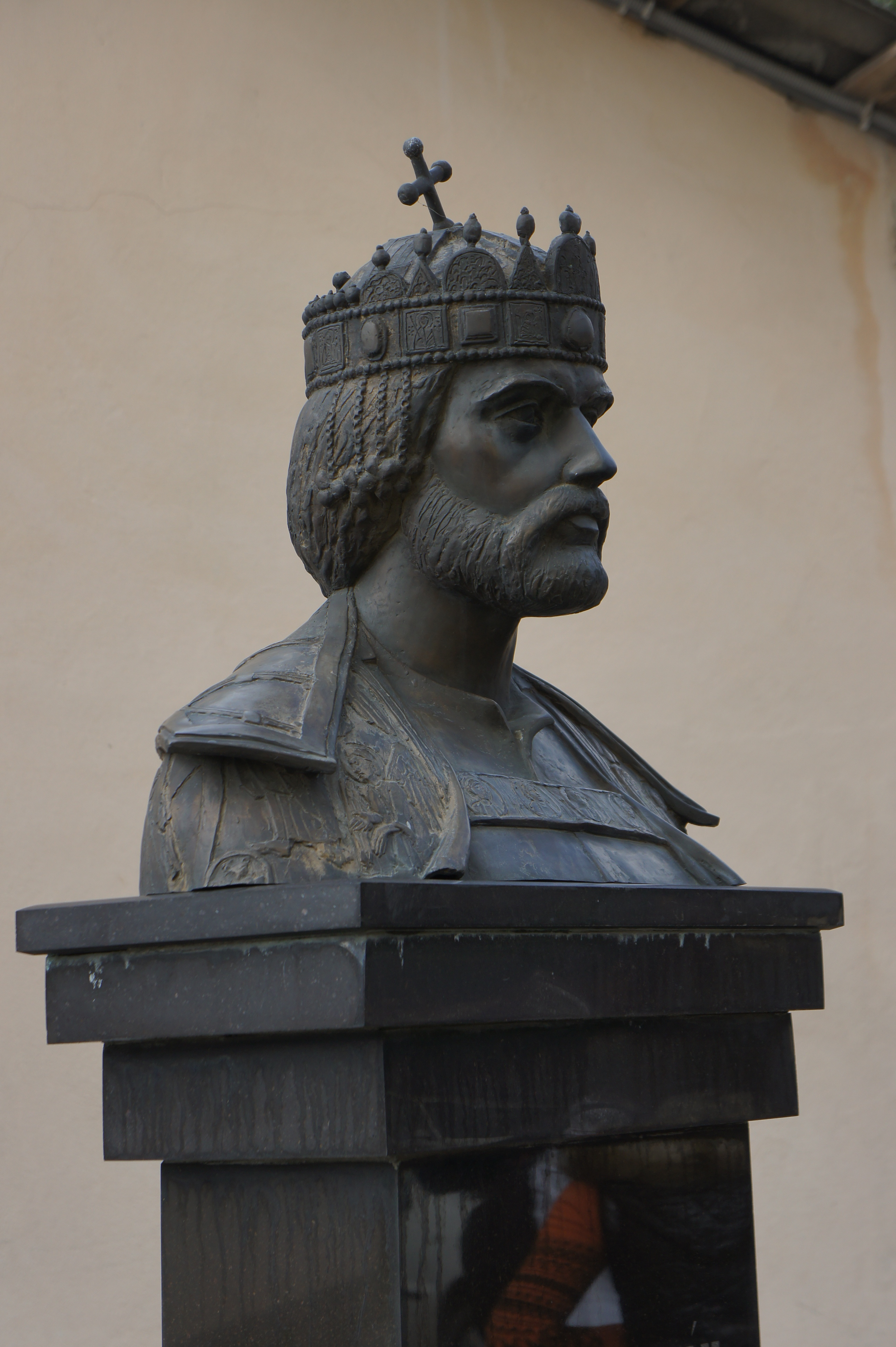 Иштван I Святой (первый король Венгрии) / Saint Stephen I (the first king of Hungary)